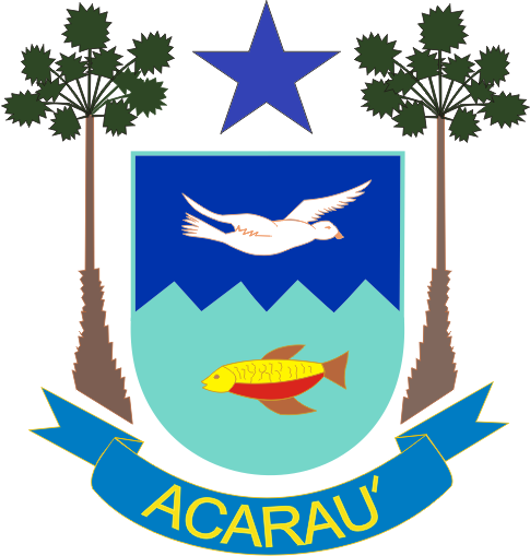 Brasão do Municipio de Acaraú